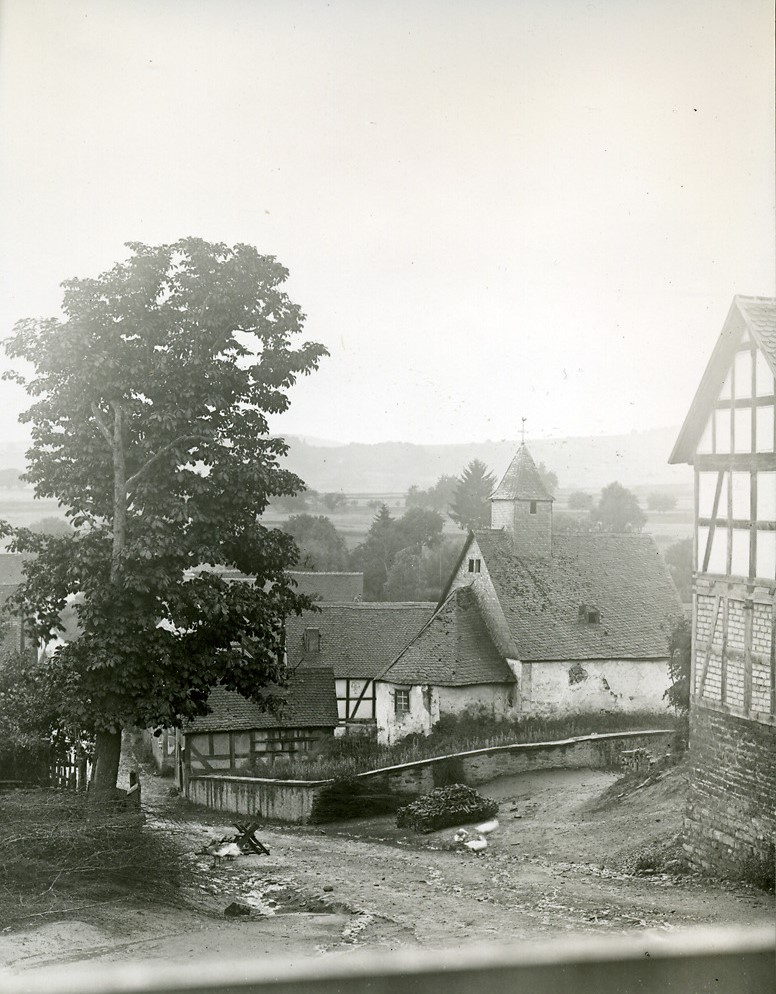 Alte Evangelische Kirche Altenvers, Hessen, Deutschland